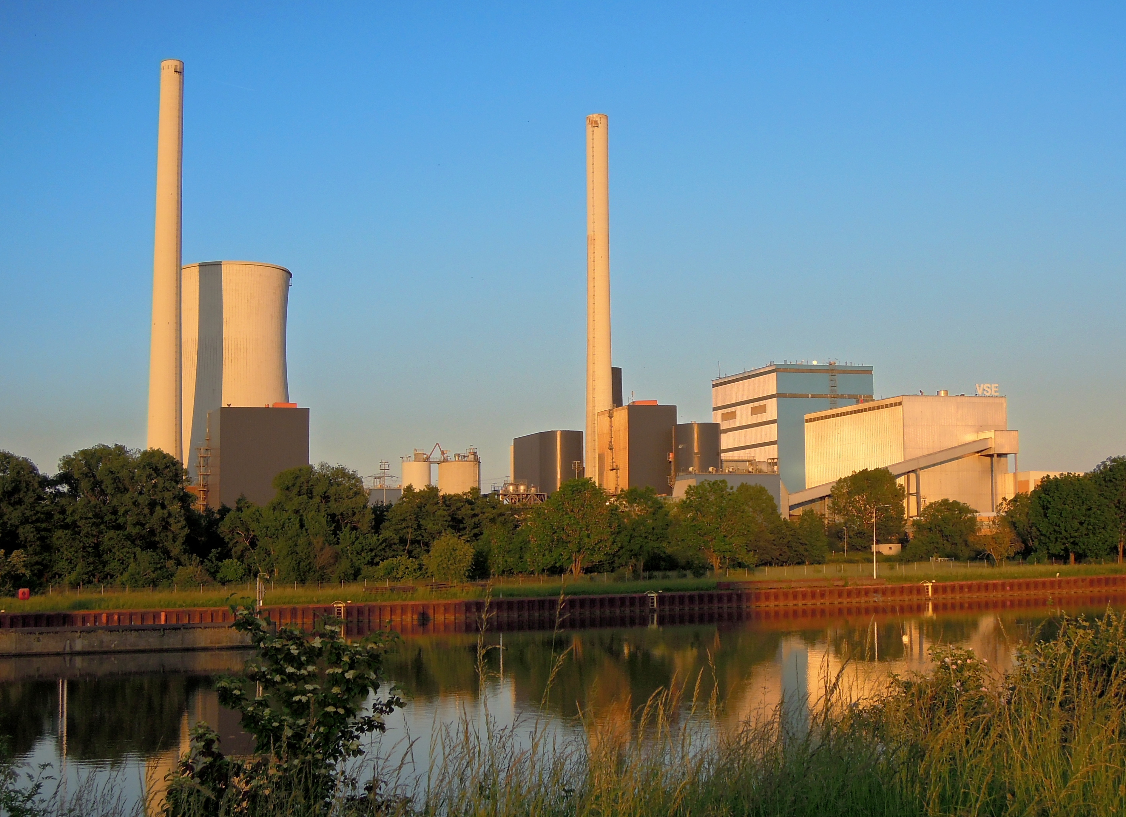 Kraftwerk Ensdorf von der Staustufe gesehen